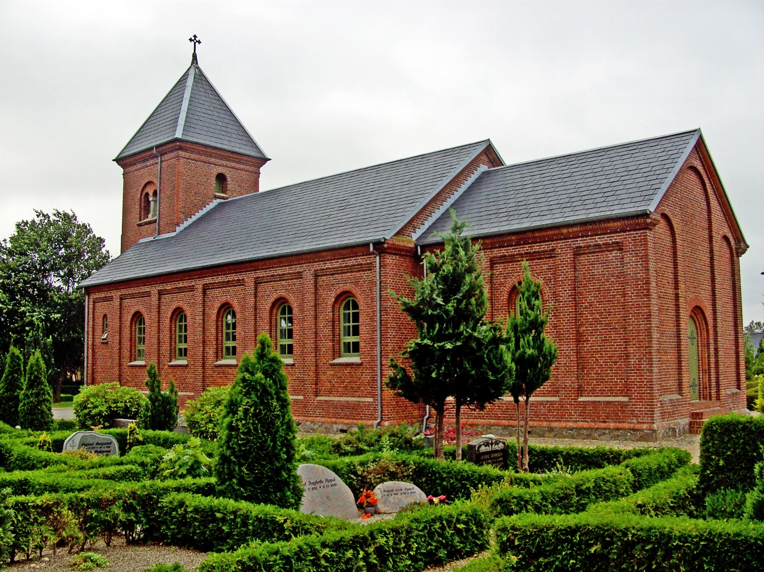 fra sydøst